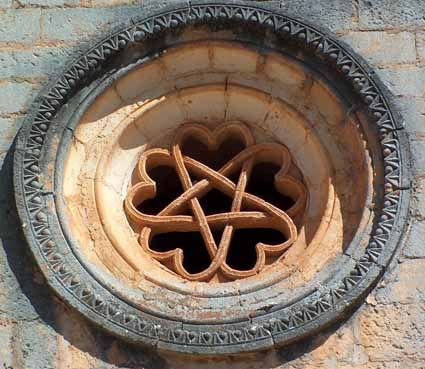 San Bartolomé de Ucero - Rosetón La foto está realizada por mí; la cedo a Wikipedia